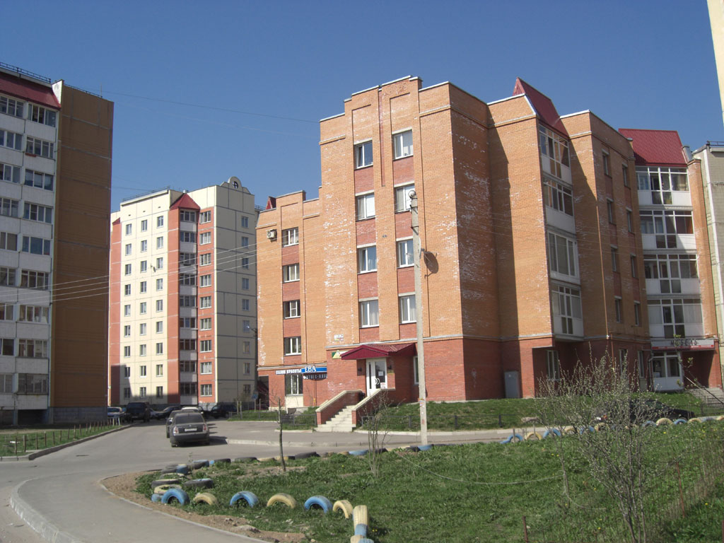 Улица Изотова в Гатчине